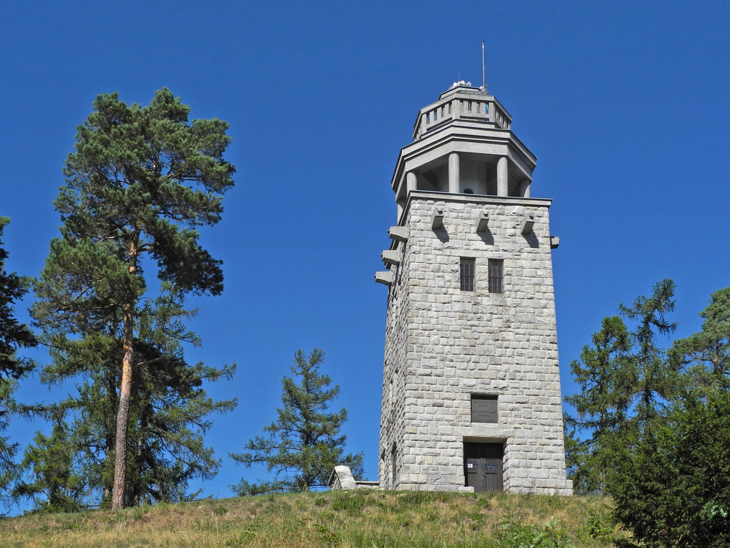 Die Kudlichwarte auf dem Strážiště-Berg in Lobenstein (Úvalno), benannt nach dem Bauernbefreier Hans Kudlich (1823–1917)